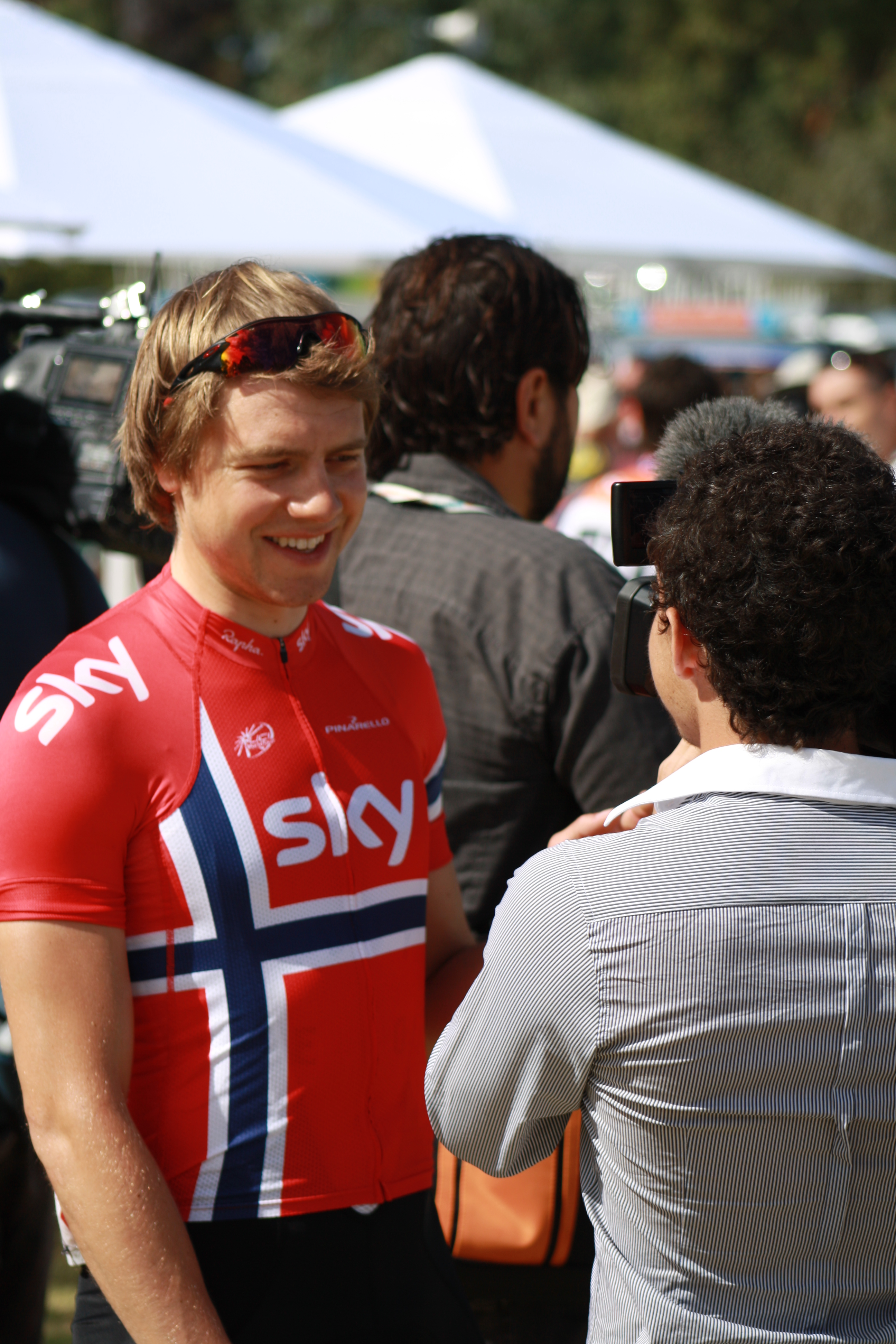 EBH